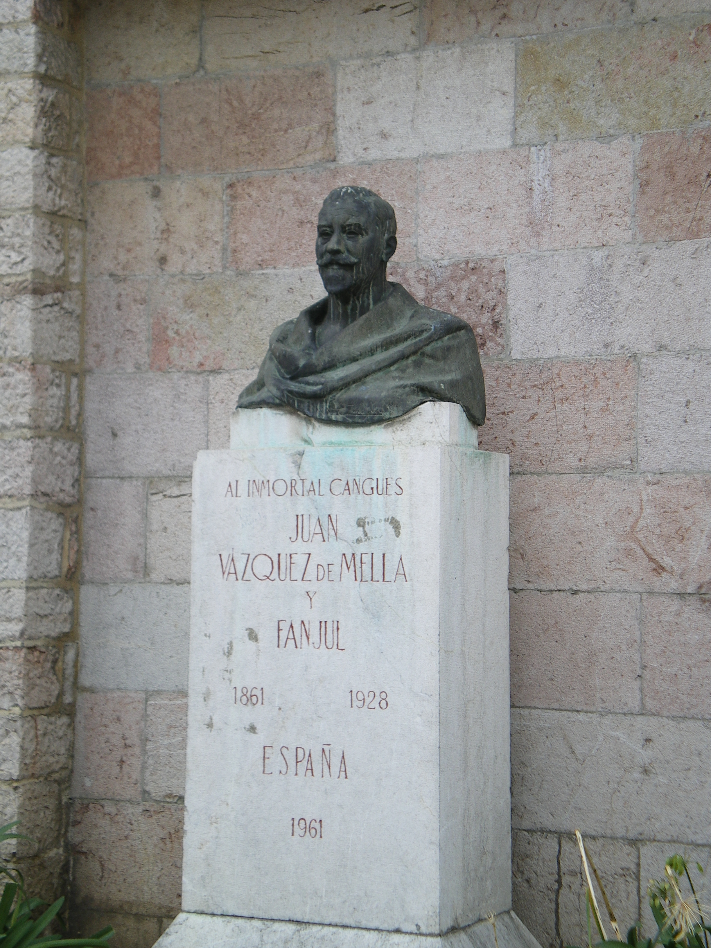 Juan Vázquez de Mella, escultura en Cangas de Onís, obra del escultor Gerardo Zaragoza